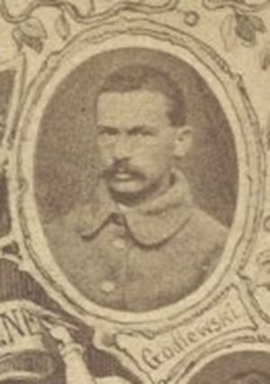 Za Wiarę i Ojczyznę 1863 polegli, fragment